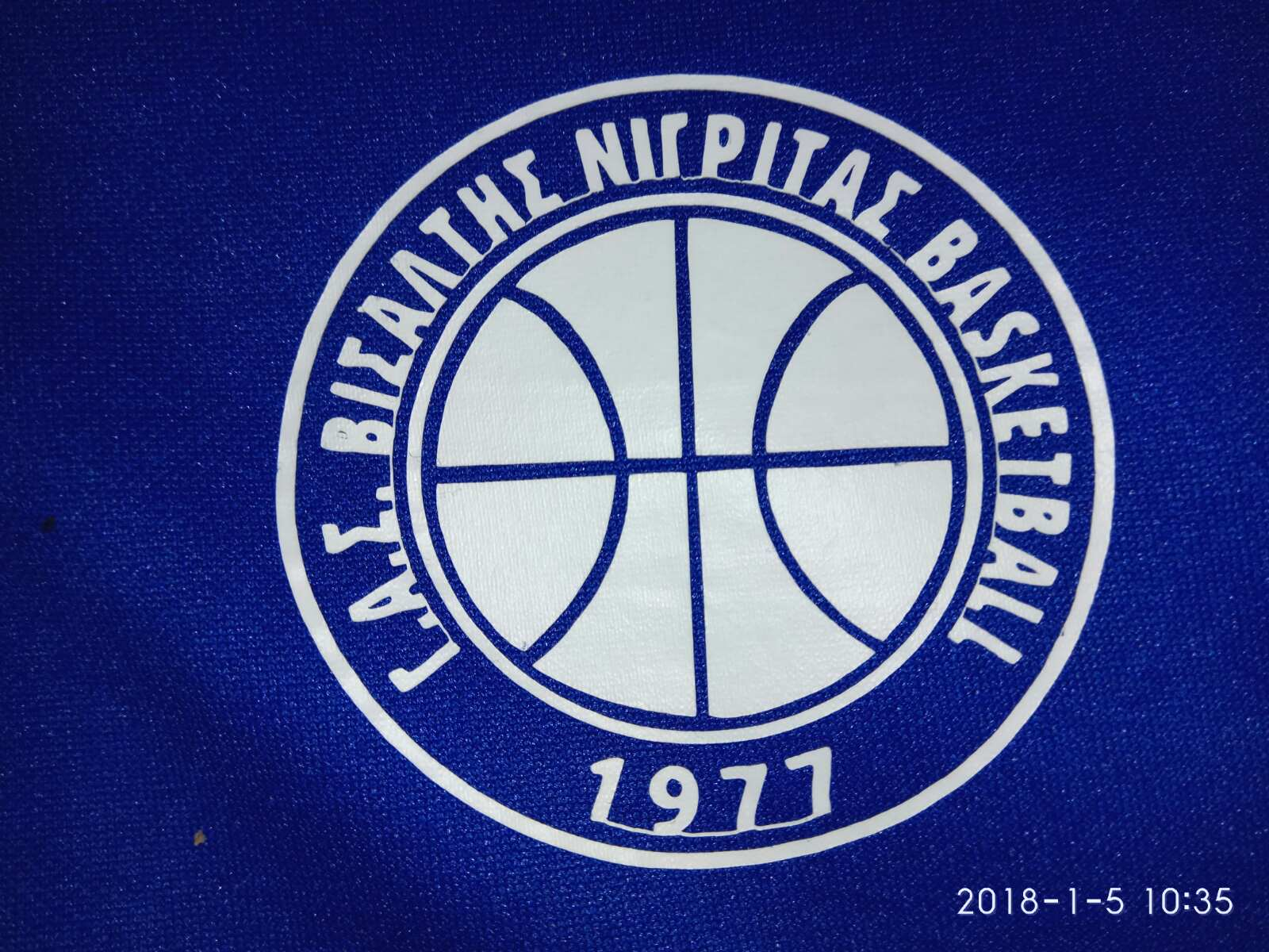 Σημα ομάδας